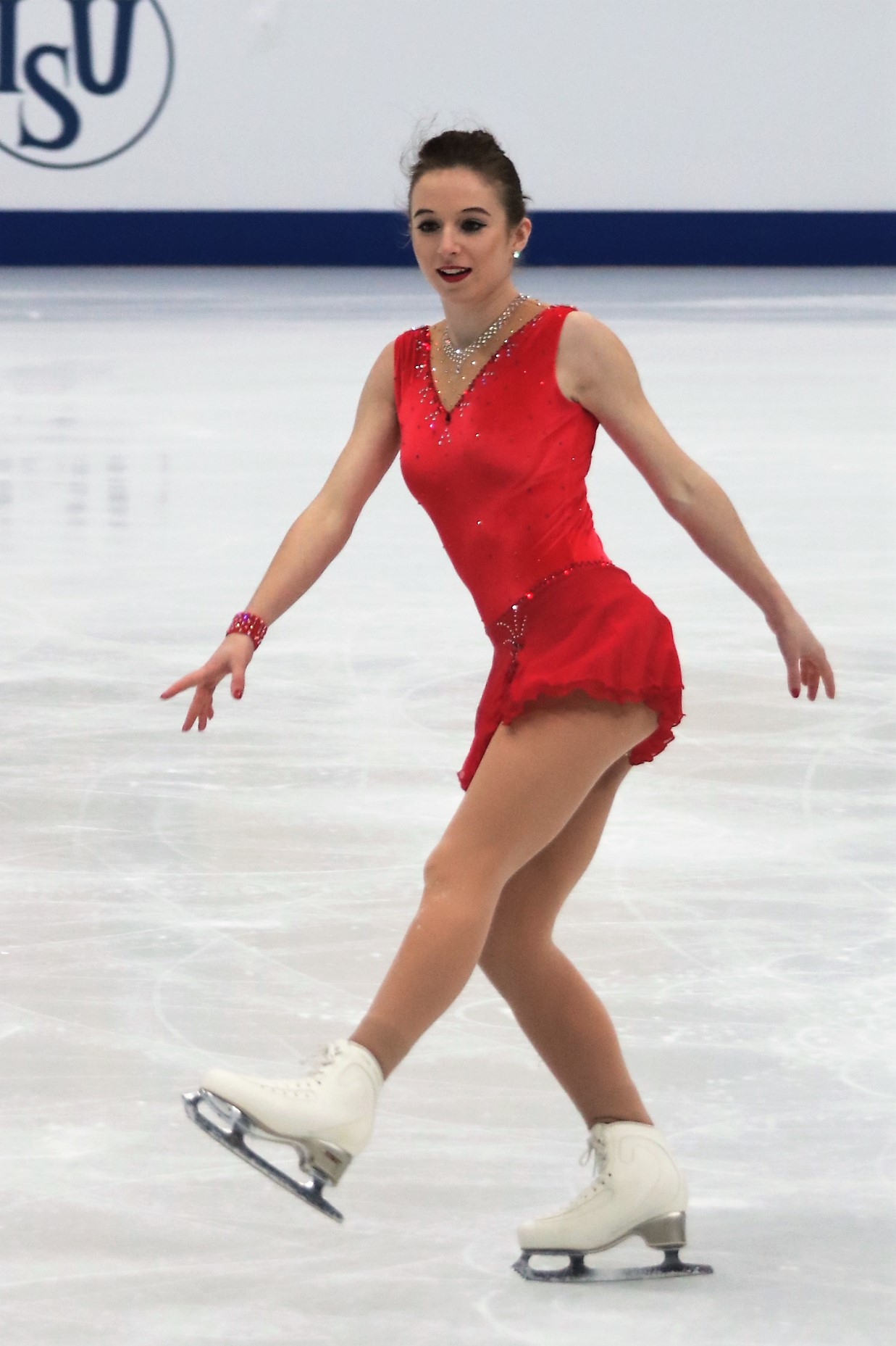 Натали Клотц (Австрия) на Чемпионате Европы по фигурному катанию 2018.